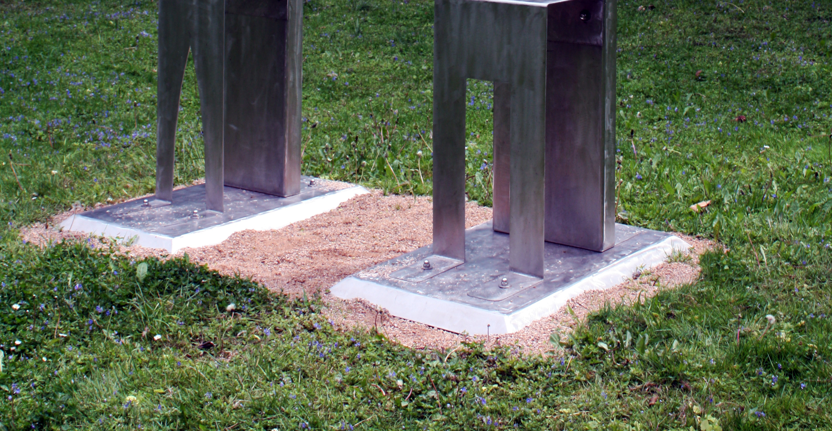 Schlosspark Köln-Stammheim, Beispiel einer Objektverankerung